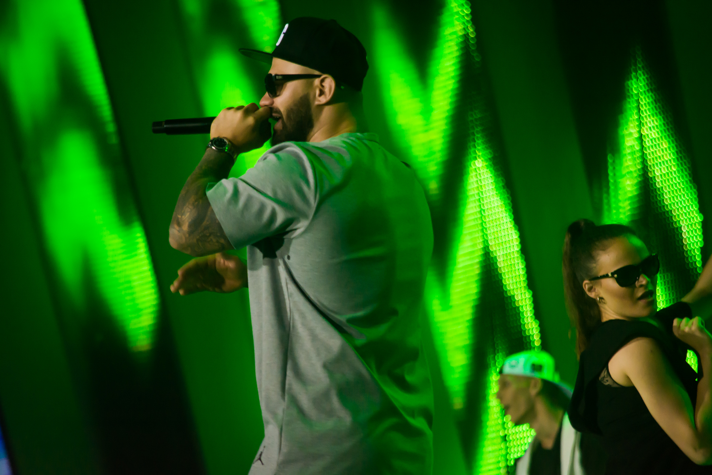 Джиган на Europa Plus TV. Hit Non Stop в Витебске 2016